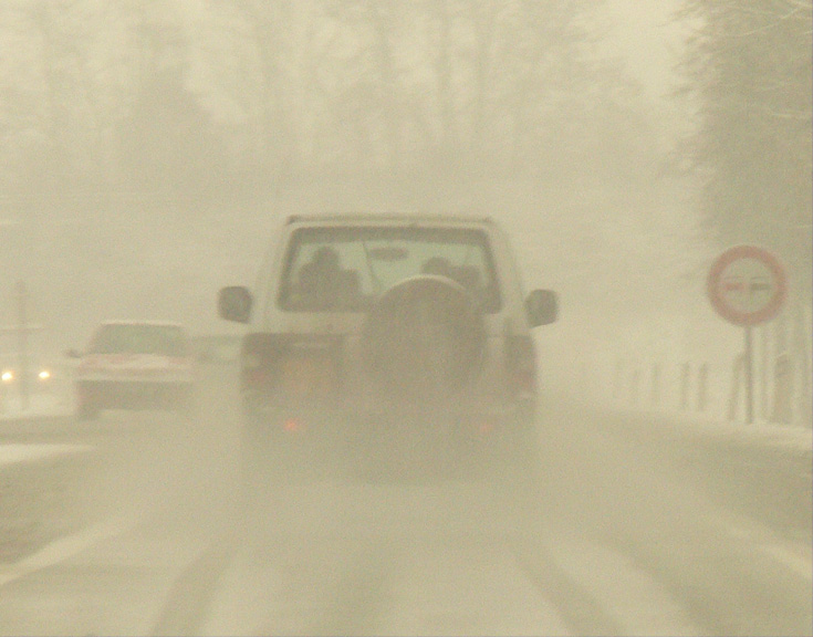 Voiture roulant sur une route salée, sous la neige et soulevant des embruns salés (Alsace, France 2005)